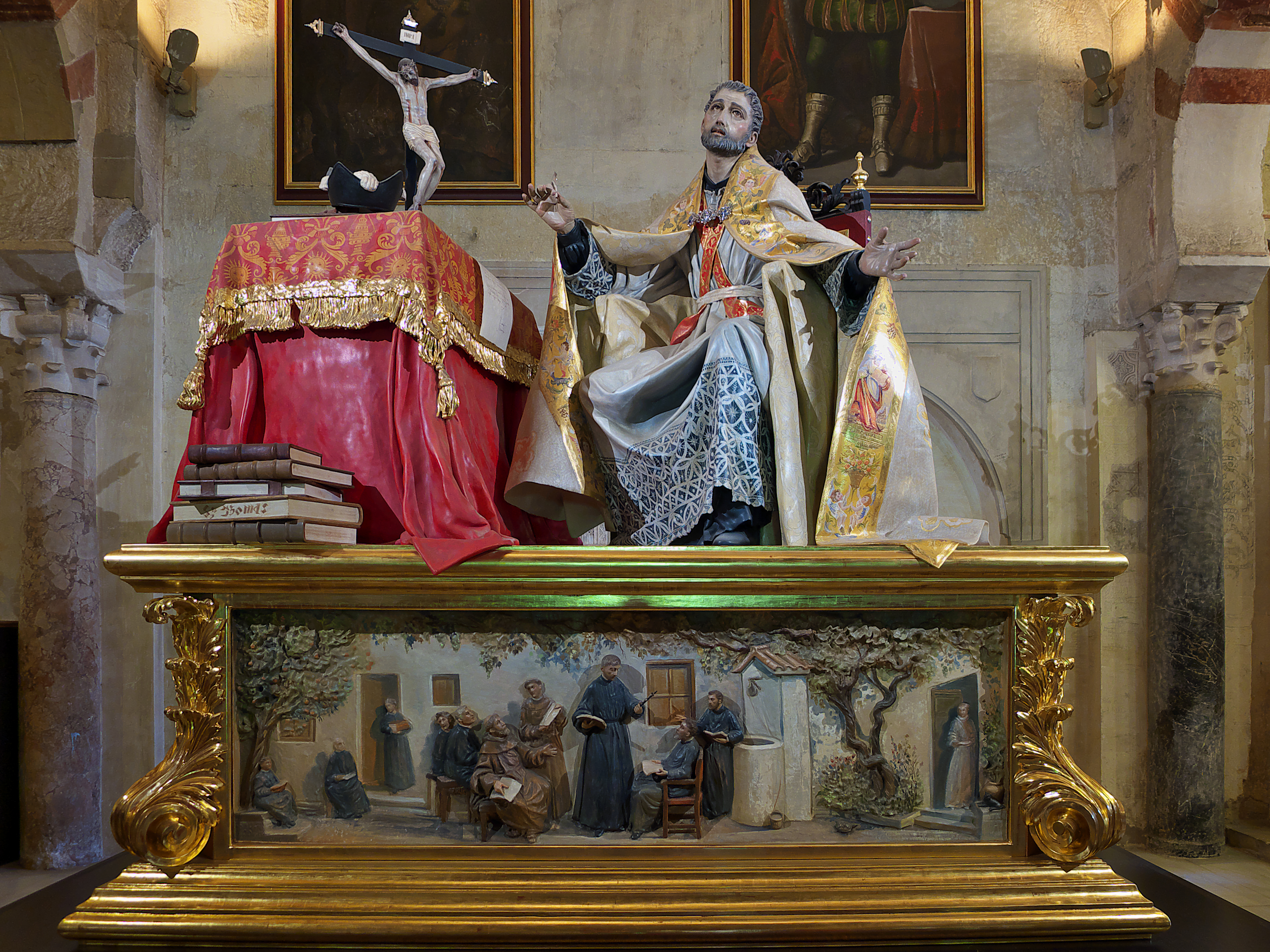 Capilla de San Juan de Ávila. Conjunto escultórico de Antonio Bernal Redondo (2013)